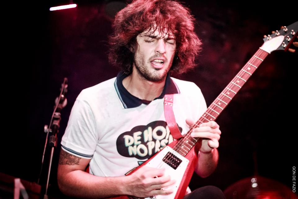 una foto de joaco